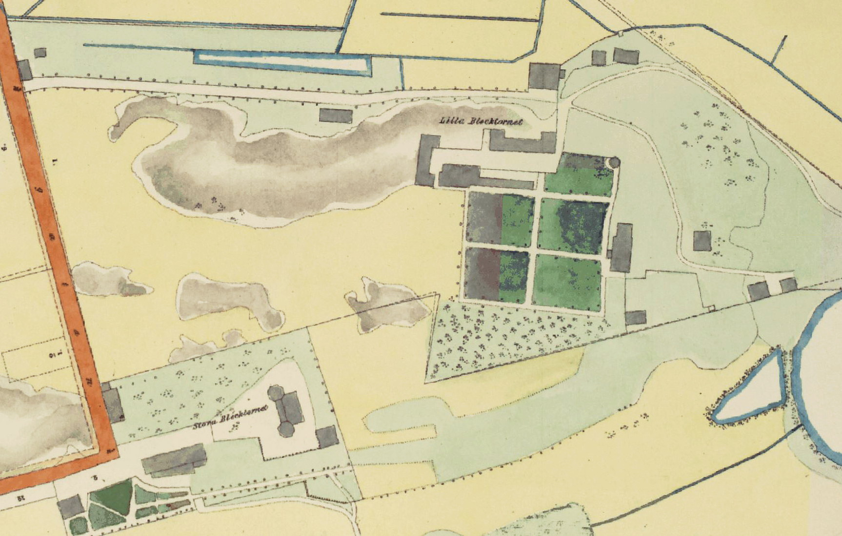 Del av 1863 års karta över Stockholm visande Lilla och Stora Blecktornet